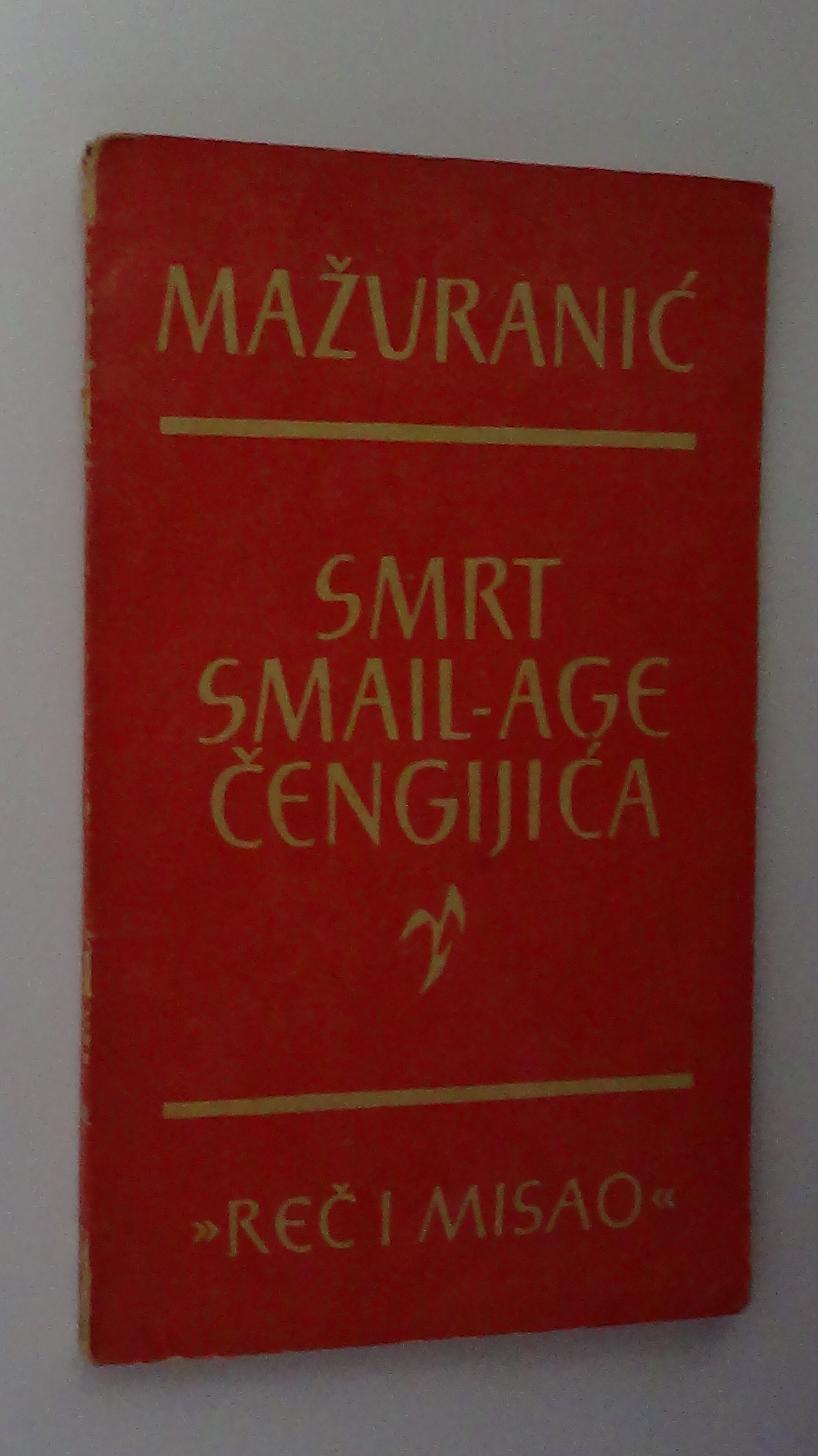 Корицата на „Смртта на Смаил-ага Ченгиќ“, Рад, Белград, 1960.